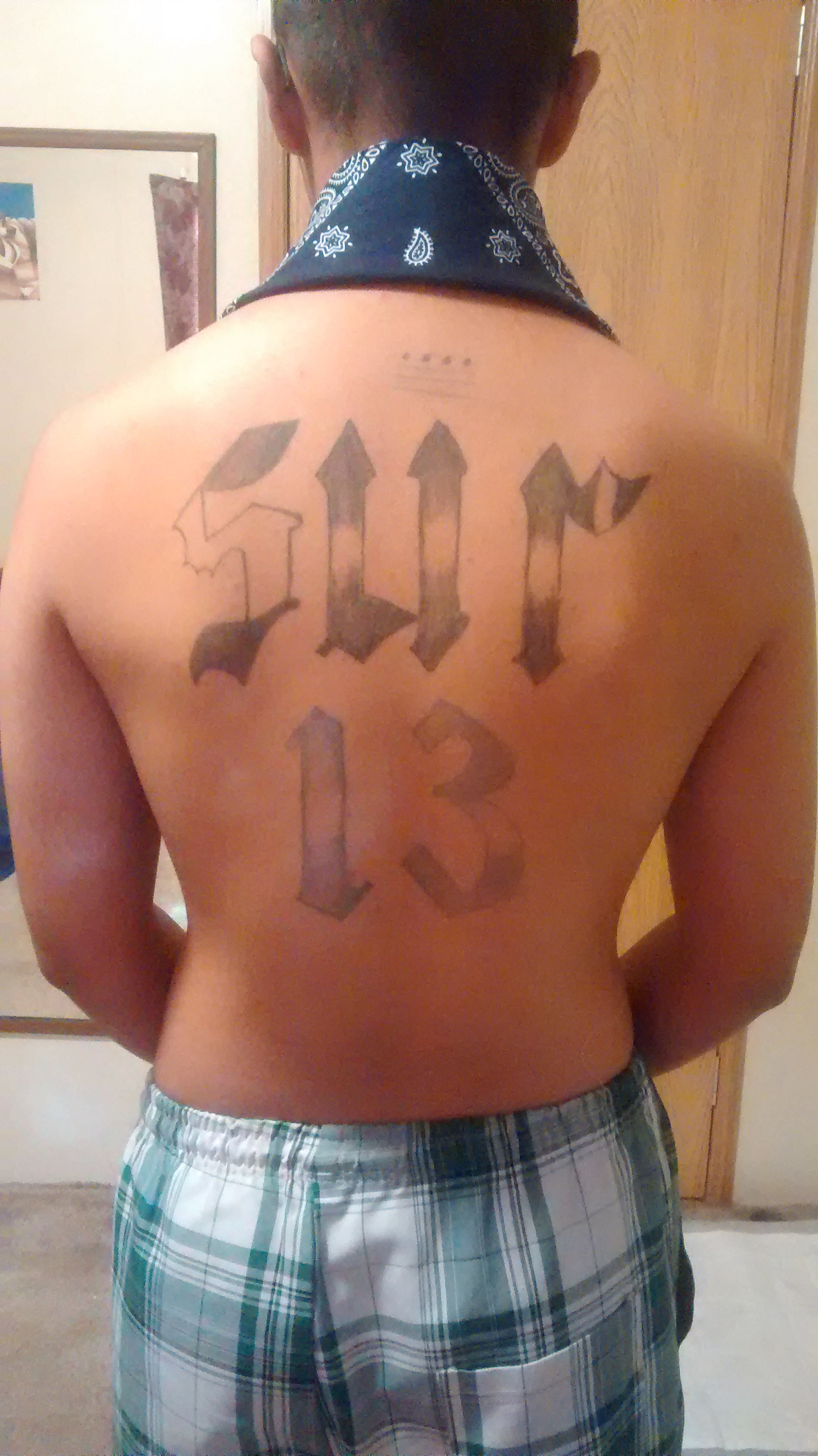 Sur13 Tattoo